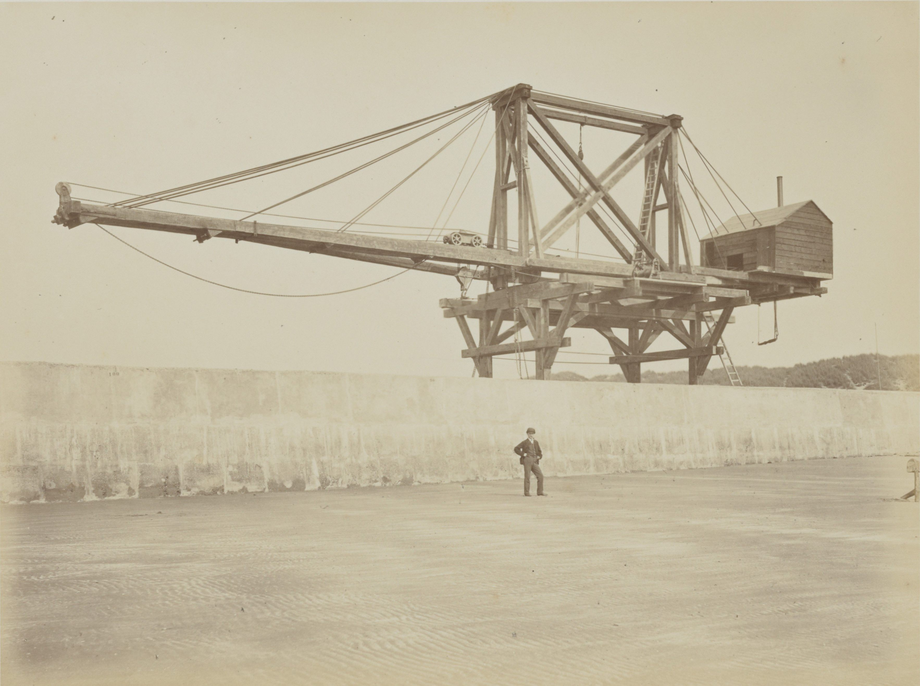 Collectie / archief : Fotocollectie Rijkswaterstaat : Metadata : Collectie / Archief : Fotocollectie Rijkswaterstaat Reportage / Serie : Noordzeekanaal Beschrijving : Houten takelinstallatie (Titan) op het Noorderhoofd Datum : 1870-1875 Locatie : IJmuiden, IJmuiden, Noord-Holland, Noord-Holland Trefwoorden : havendammen, hijsinstallaties, takelmachines, waterbouw Fotograaf : Oosterhuis, Pieter Auteursrechthebbende : Public Domain logo Materiaalsoort : Foto (zwart/wit) Nummer archiefinventaris : bekijk toegang 2.24.11 Inventarisnummer : 64 Bestanddeelnummer : 562